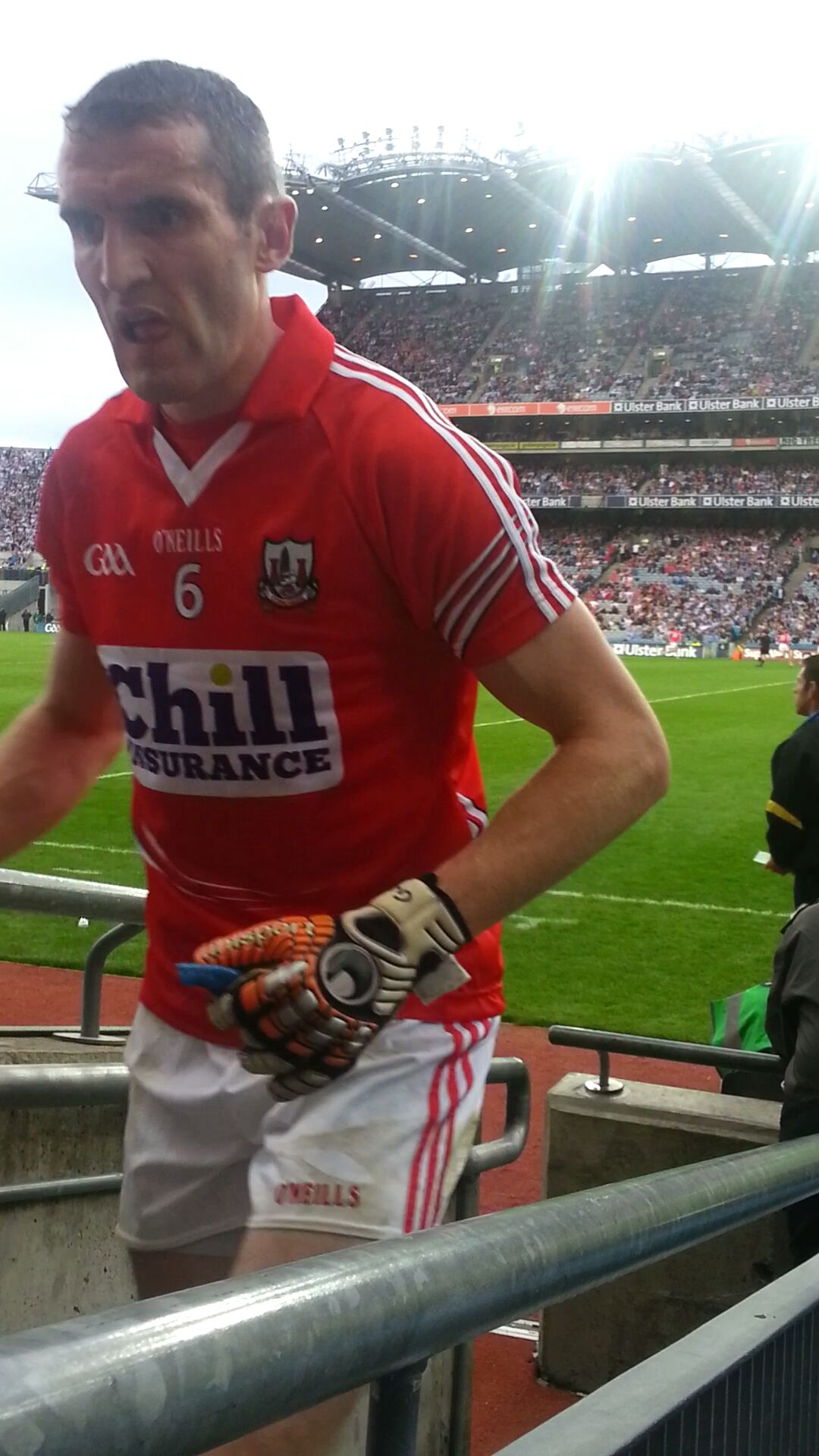 photo de Graham Canty (footballeur gaélique) à l'occasion du quart de finale de All Ireland contre Dublin GAA